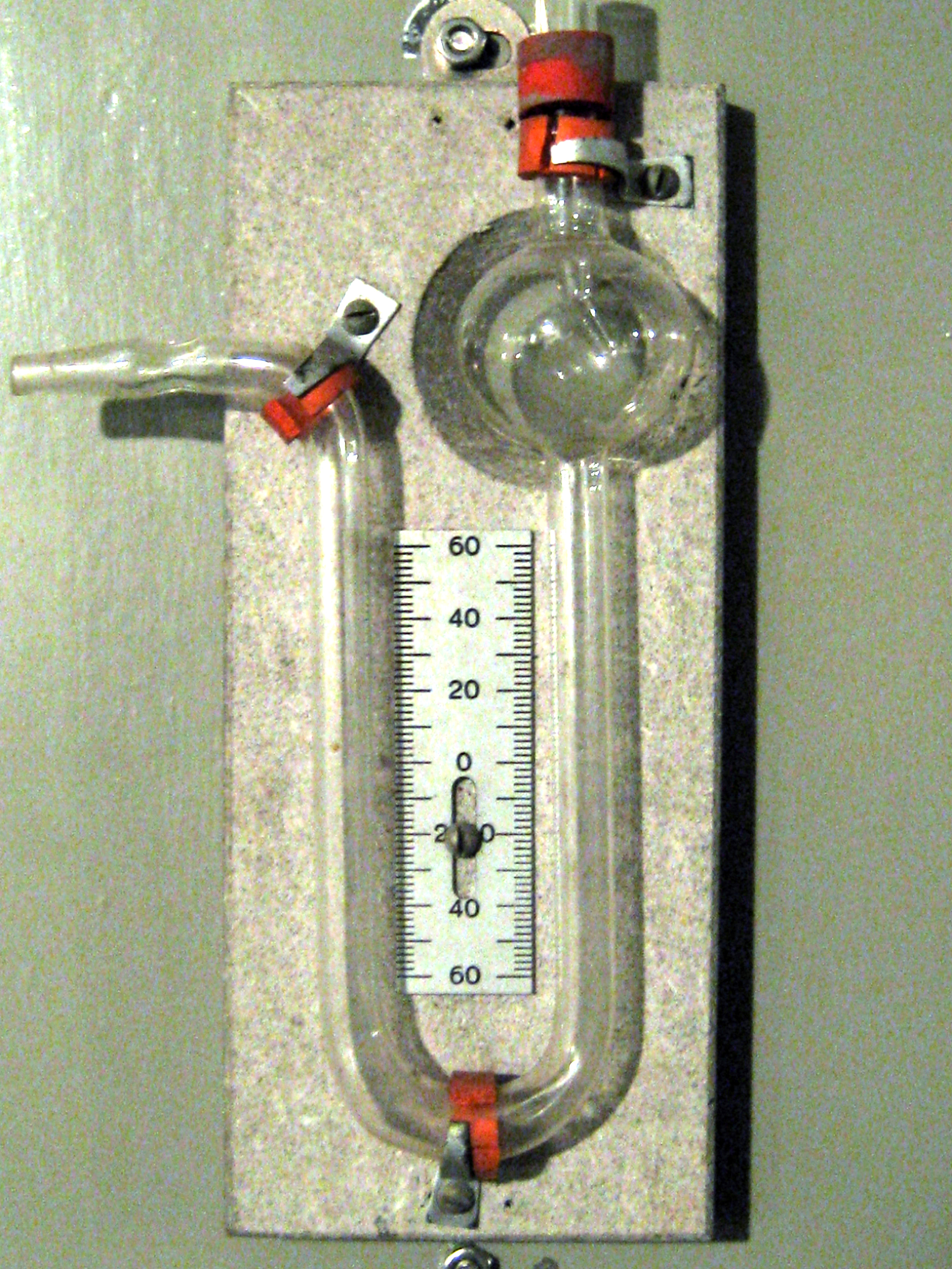 Infanteriewerk A 7838 in Sufers, Kanton Graubünden: U-Rohr-Manometer zur Überwachung des Überdrucks der Atemluftzufuhr